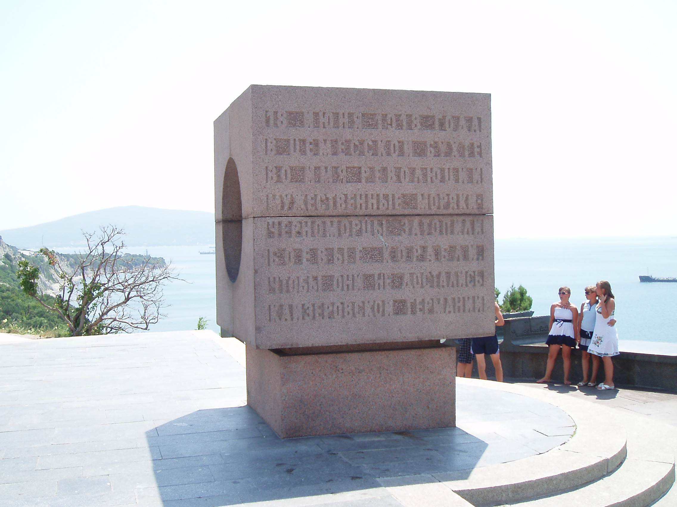 Памятник морякам-черноморцам, которые по призыву советского правительства 18 июня 1918 г. в Цемесской бухте затопили боевые корабли черноморского флота, чтобы они не достались кайзеровской Германии: шоссе Сухумское, 12 км, Новороссийск, Краснодарский край